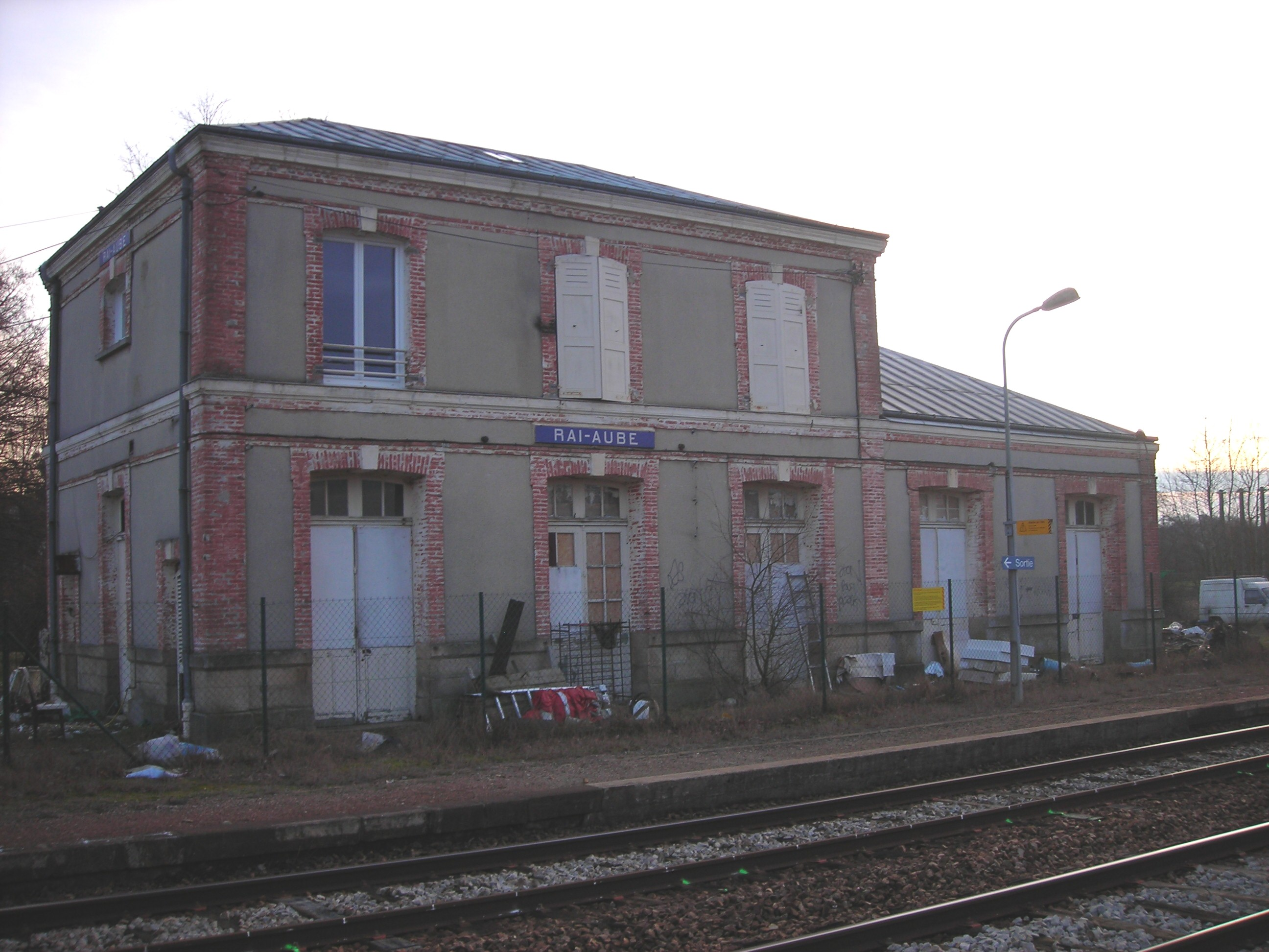 Gare de Rai - Aube(Orne, France), vue de coté quaie, ancien bâtiment voyageur.